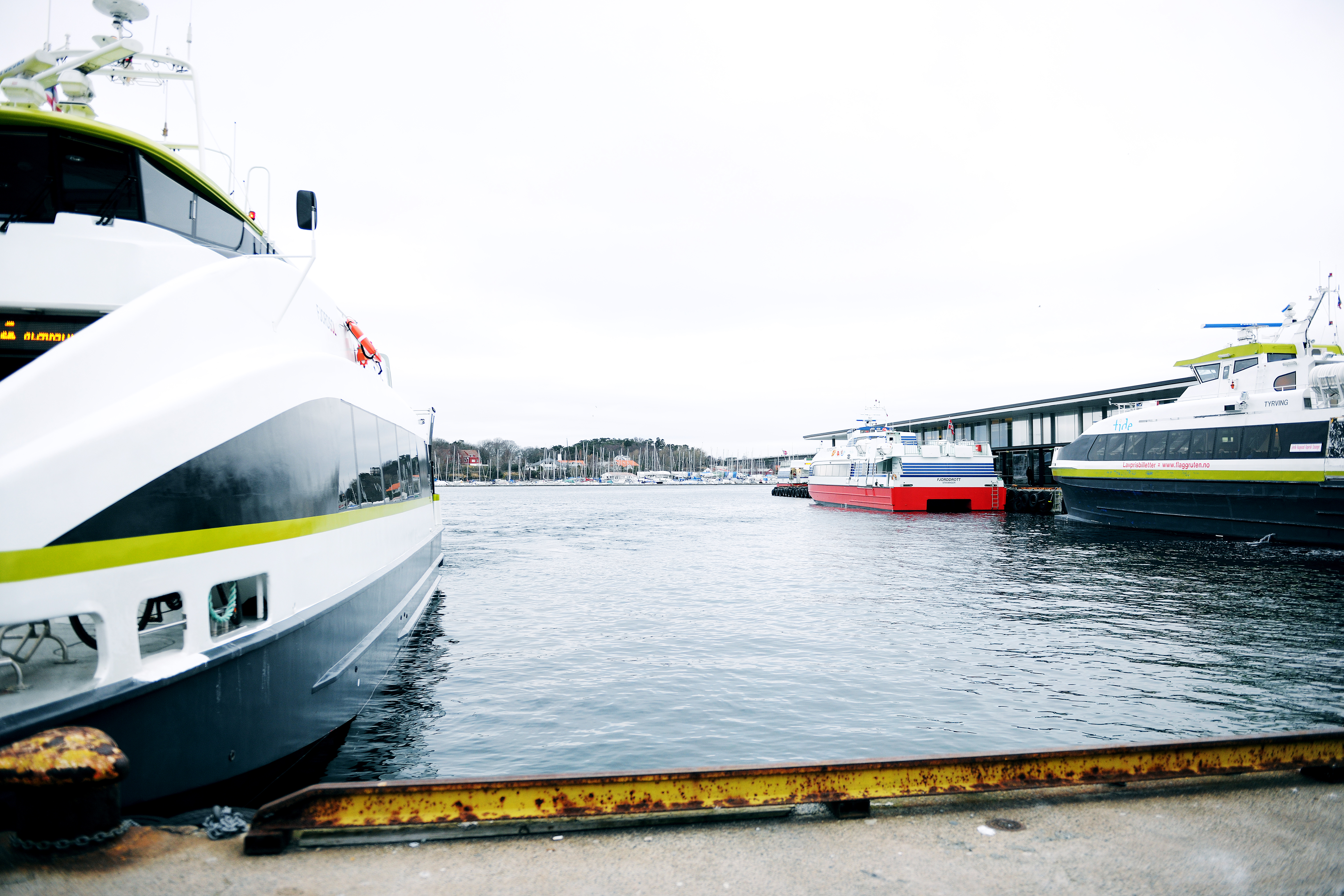 Fiskepirterminalen i Stavanger er avgangssted for de fleste av Kolumbus' hurtigbåtruter.